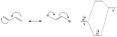 referencia conjugação